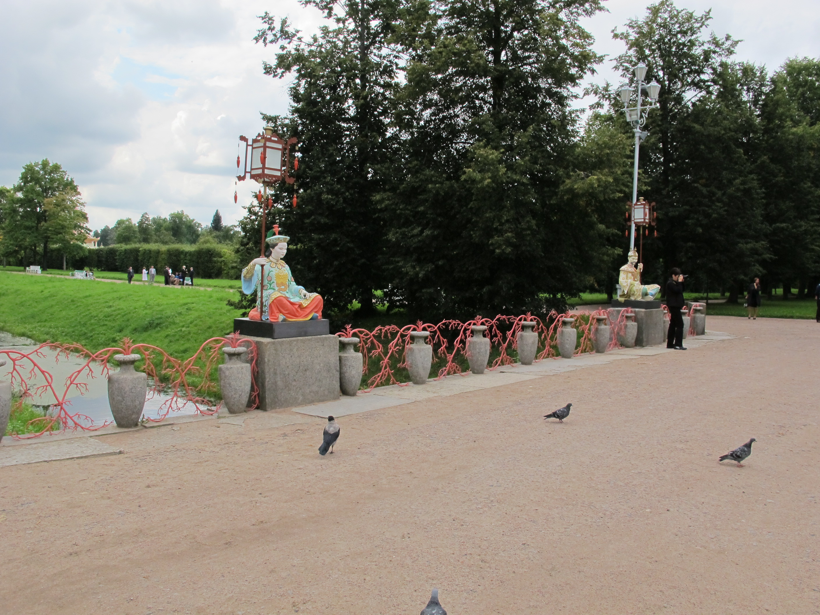 Parco di alessandro, ponte cinese